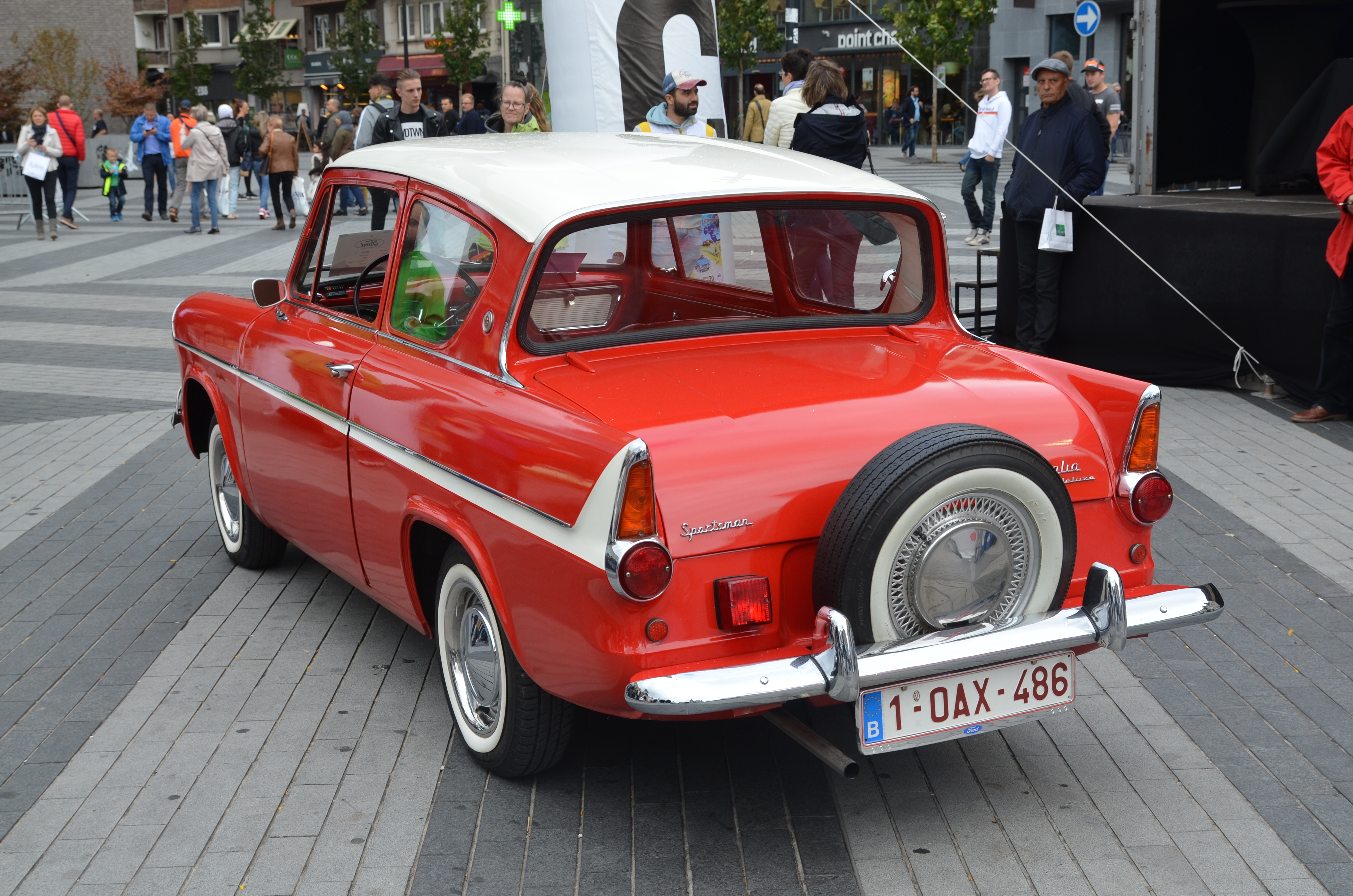 Ford Anglia Sportsman. Version élaborée pour le marché belge, elle offrait une roue de secours logée verticalement contre la face arrière extérieure du coffre reposant sur les ferrures de pare-chocs. Charleroi, Place Verte.